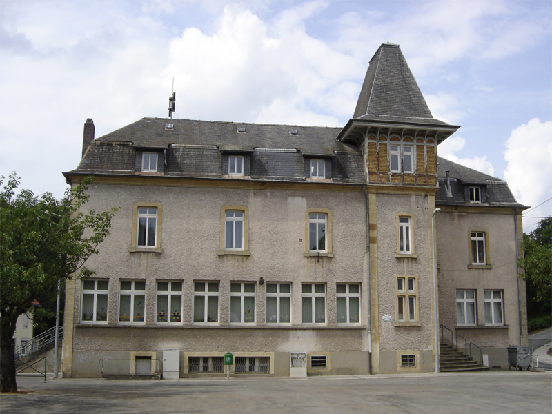 Zowaascher Primärschoul Allgemenges zum Bild: Dëst Bild weist déi al Primärschoul vun Zowaasch